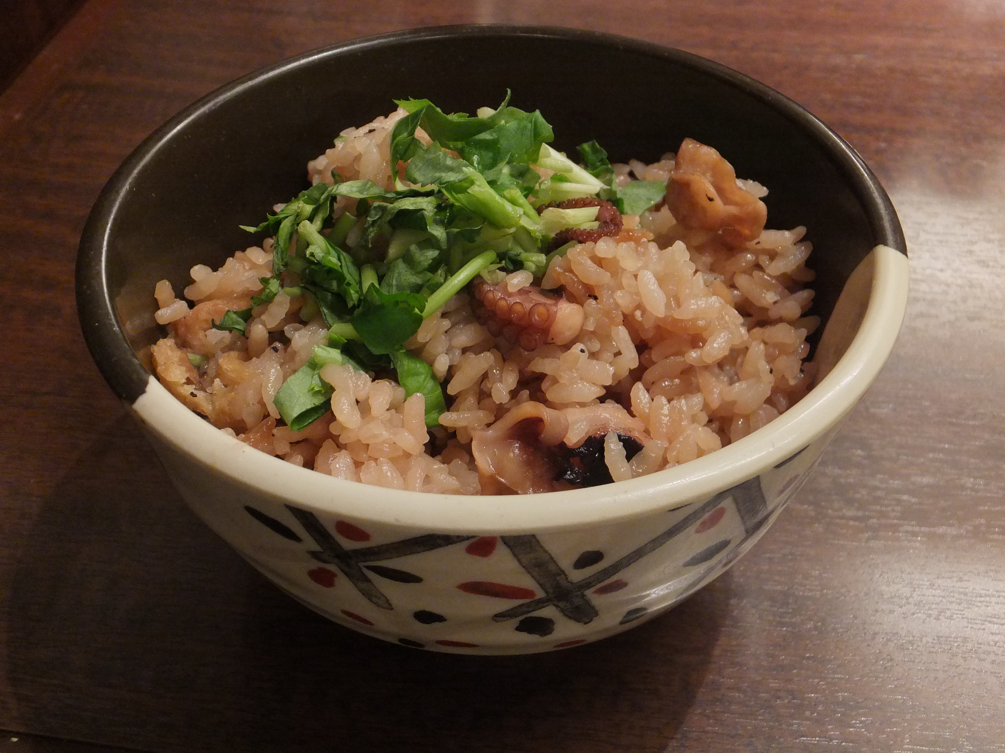 たこめし。ザめしやにて